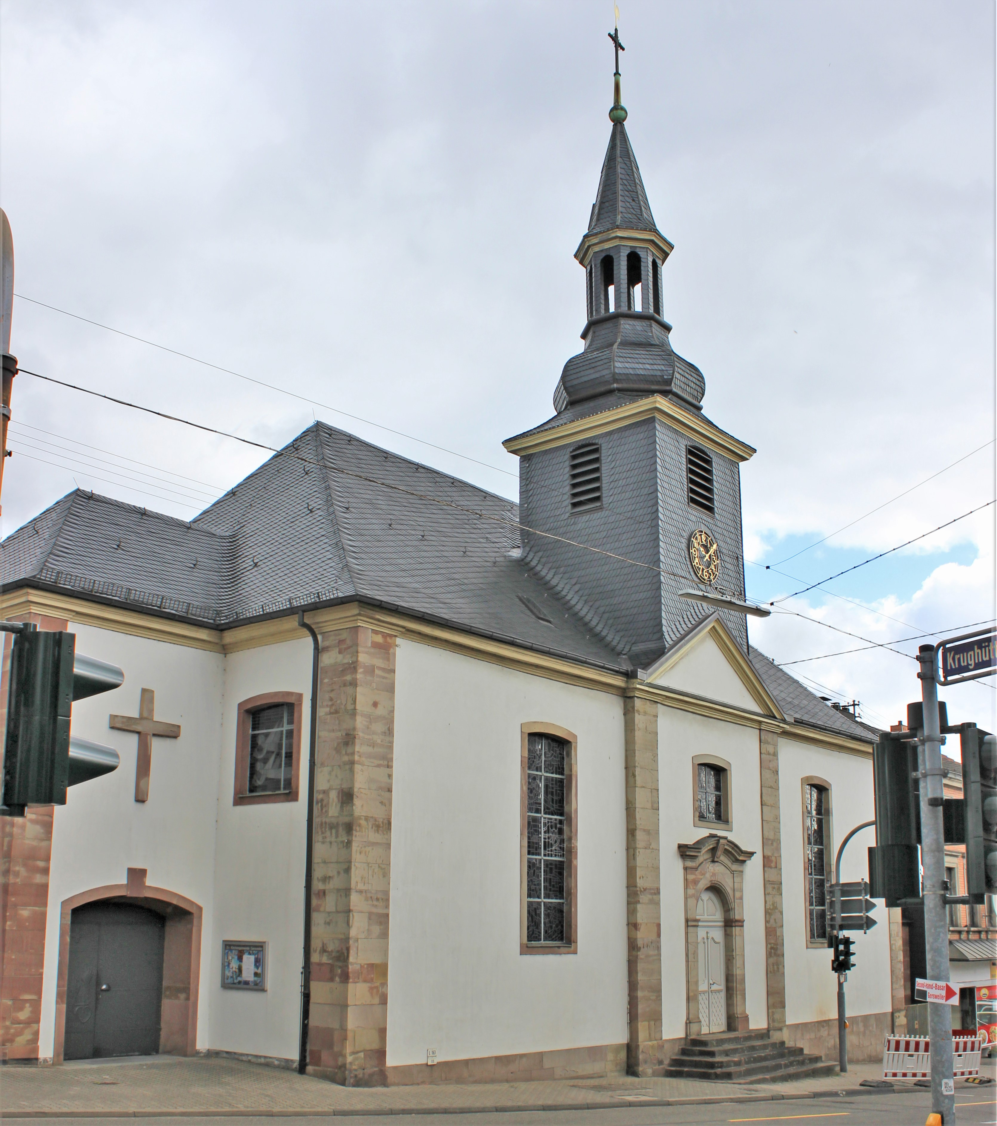 Die evangelische Kirche in Gersweiler, einem Stadtteil der saarländischen Landeshauptstadt Saarbrücken